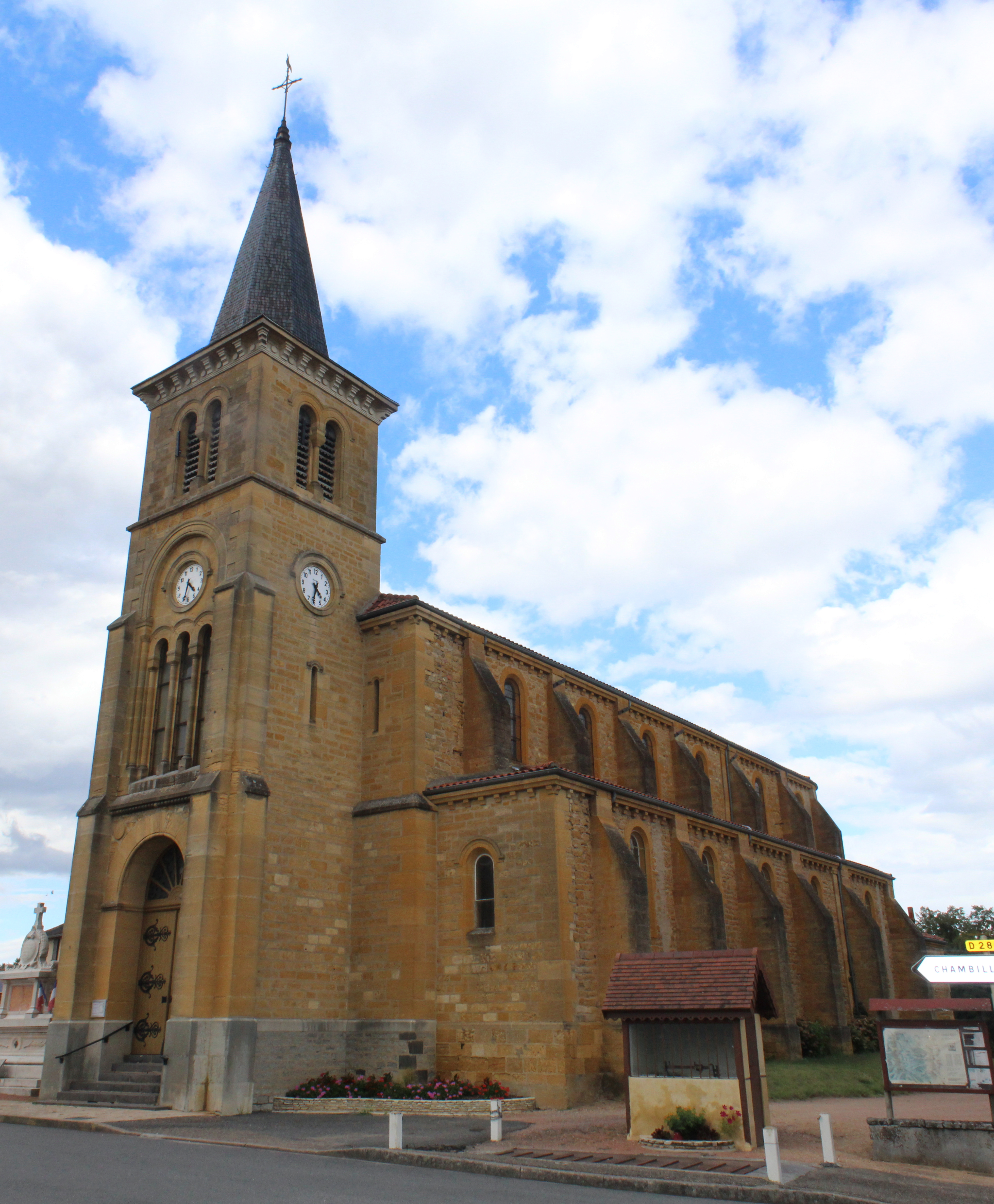 Église Saint-Julien d'Artaix.